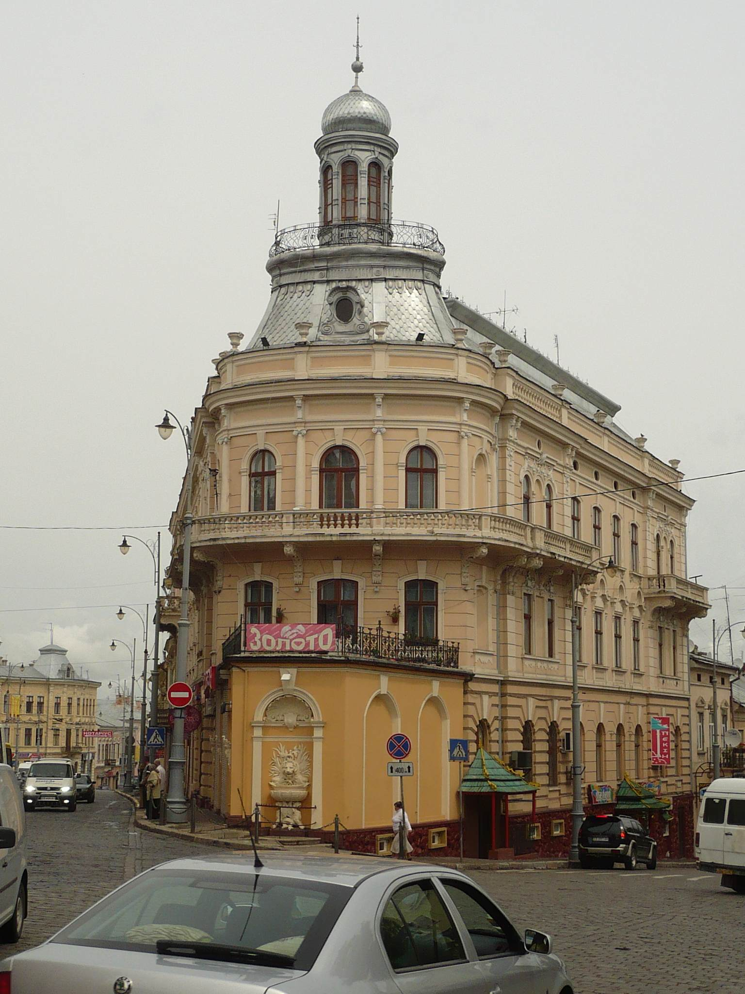 Czerniowce, kamienica "Statek", 2009 r.